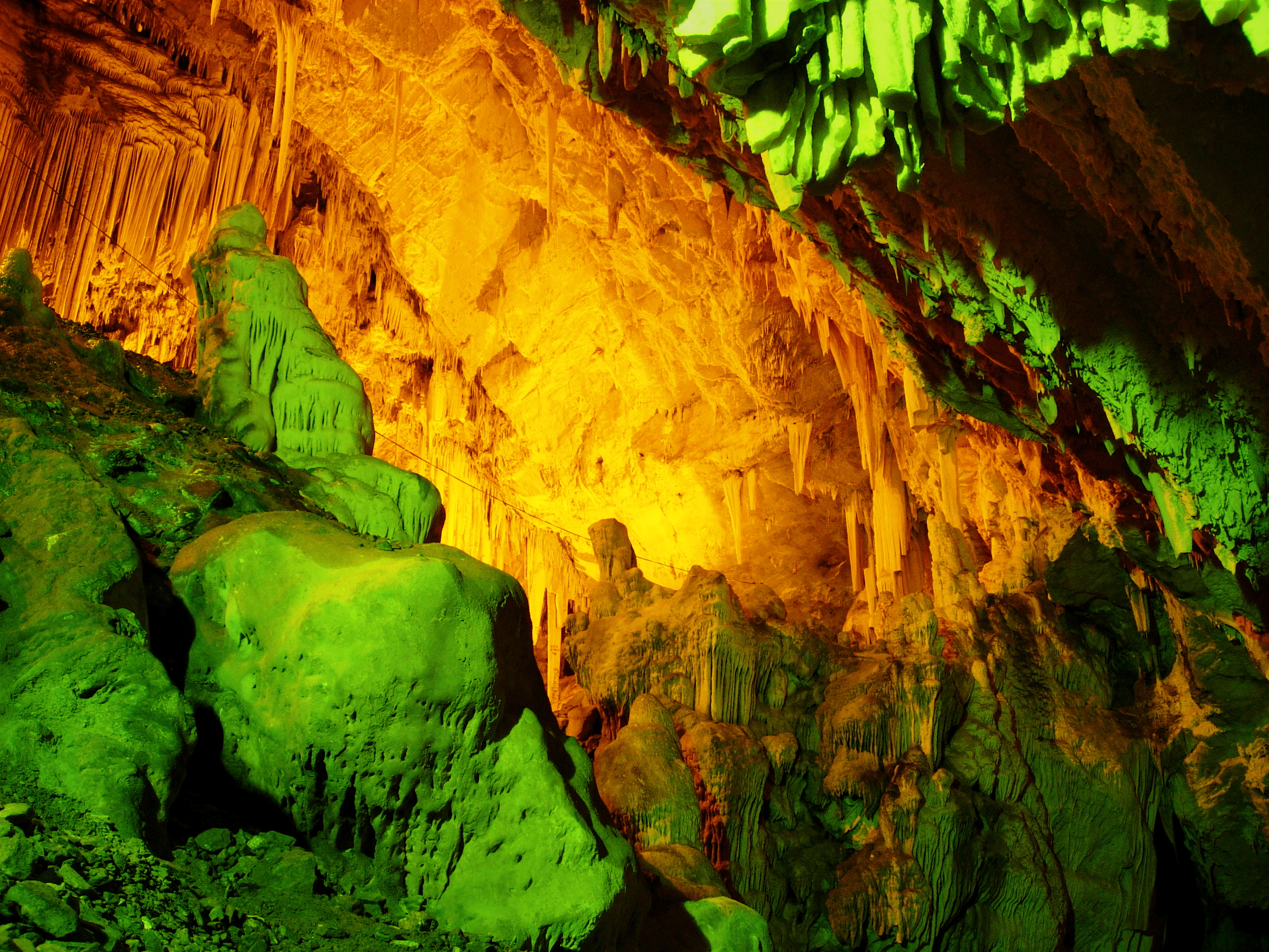 Cave, Antiparos, Greece